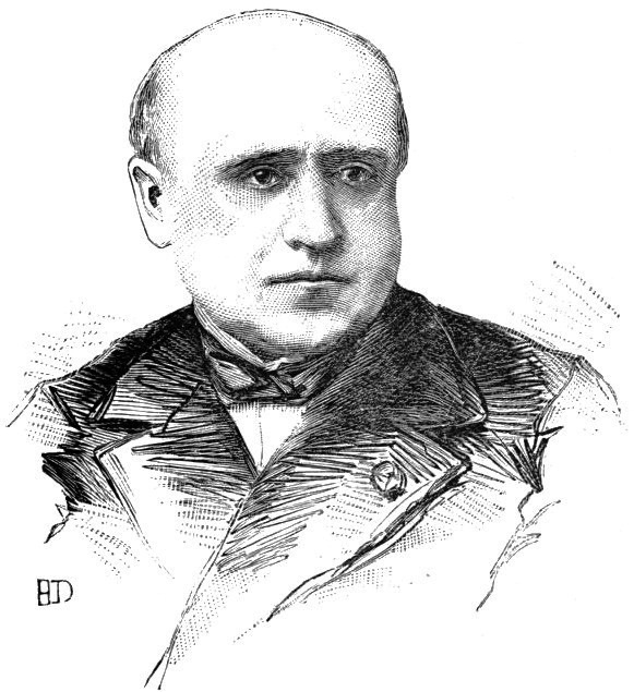 M. Brunet, ancien ministre